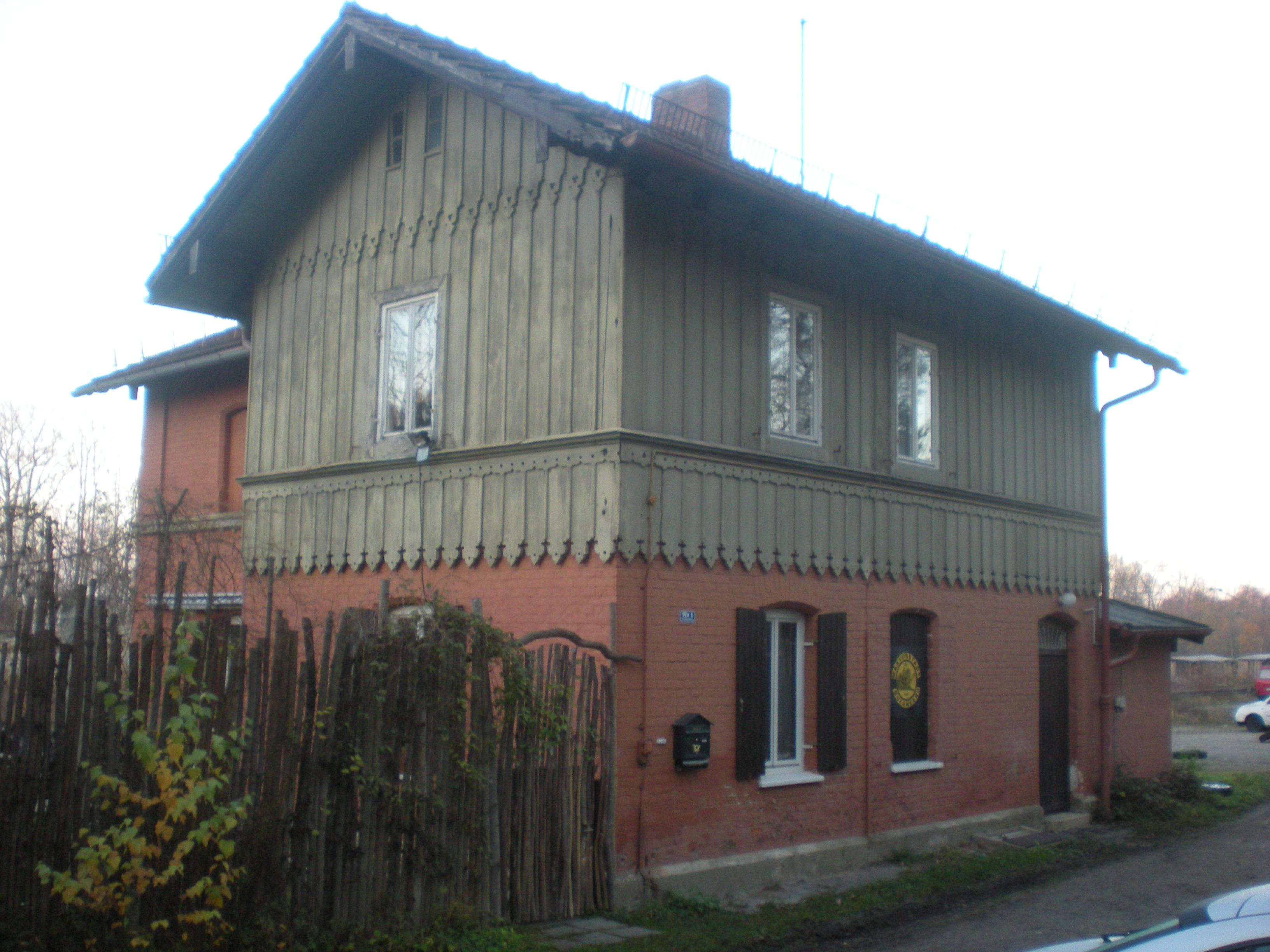 Westseite des Empfangsgebäudes des Großhesseloher Staatsbahnhofs